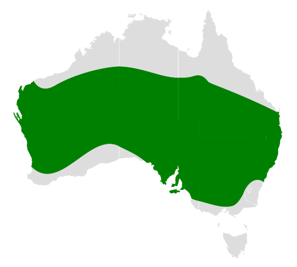 Cheramoeca leucosterna distribution map, based on